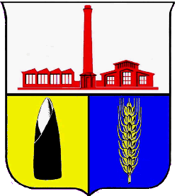 Znak města Pečky.